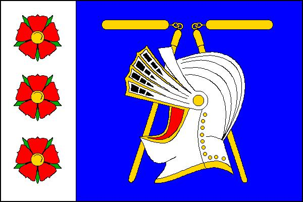 Vlajka obce Hejtmánkovice